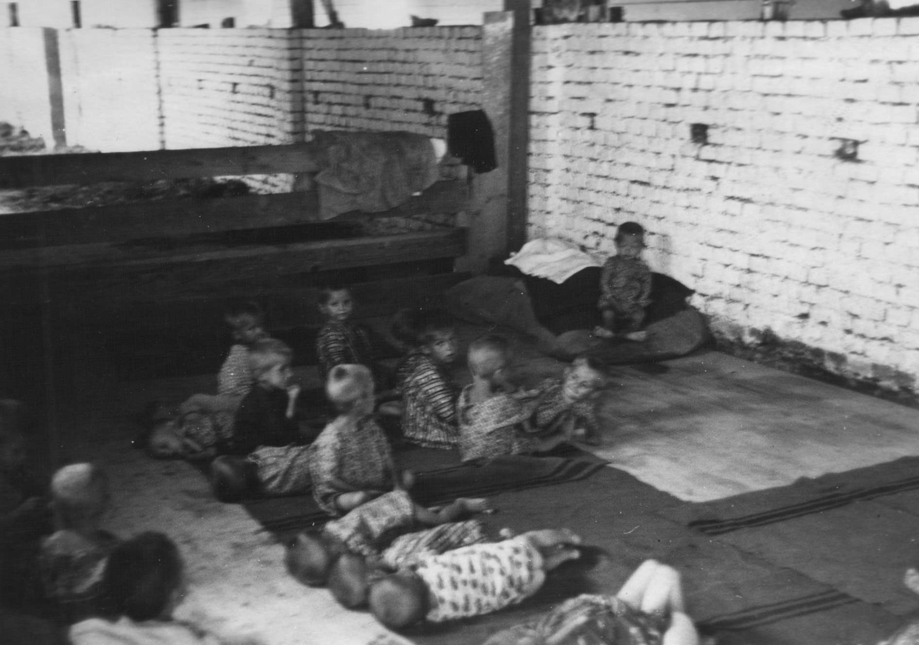 Srpskohrvatski / српскохрватски: Deca u logoru u Sisku.